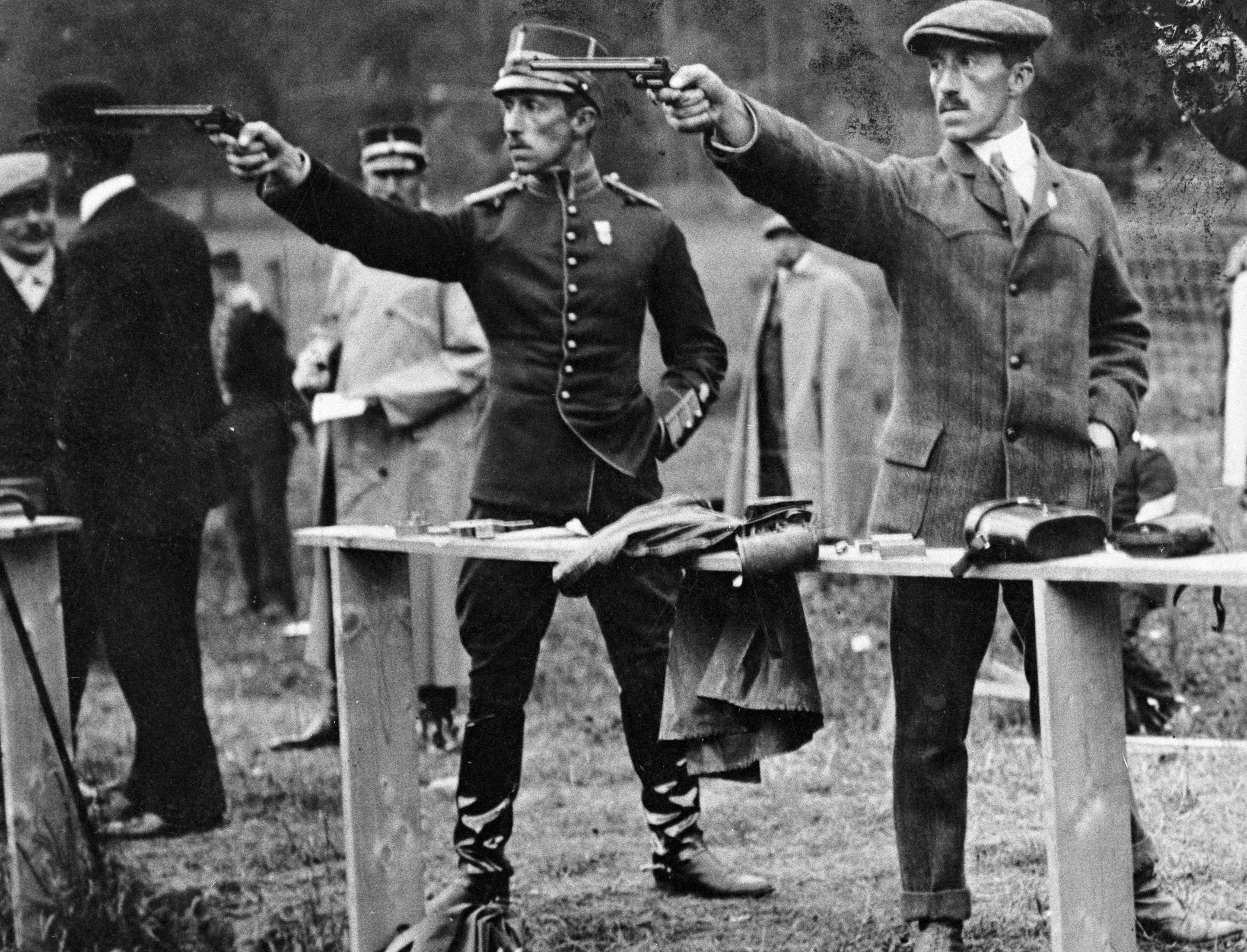 Olympiska spelen i Stockholm 1912. Löjtnanterna Eric Carlberg (t.v.) och Wilhelm Carlberg (t.h.) skjuter pistol, 50 meter.